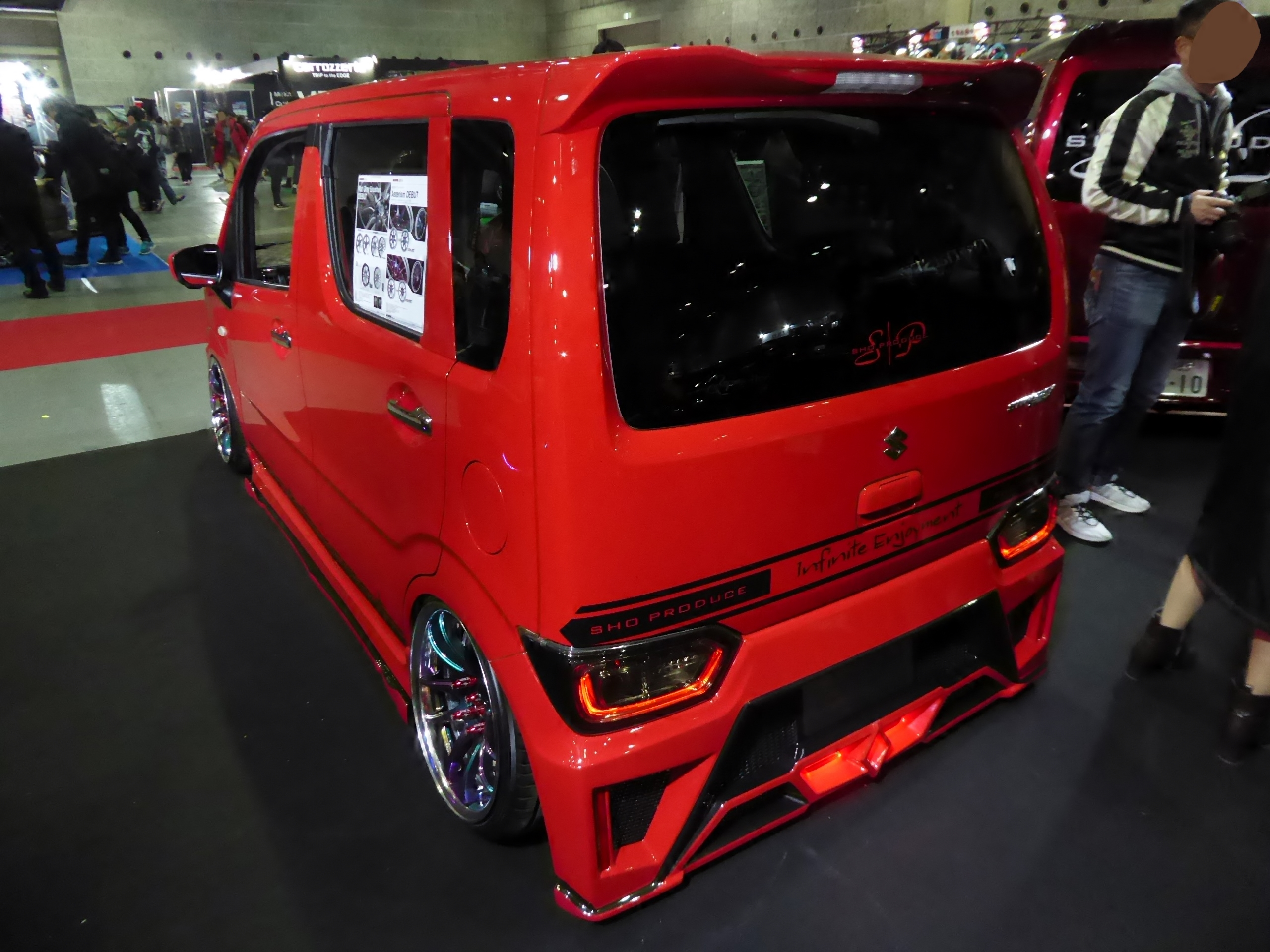 大阪オートメッセ2018に於いて翔プロデュースの手掛けたDBA-MH35S型スズキ・ワゴンRスティングレーLを撮影。